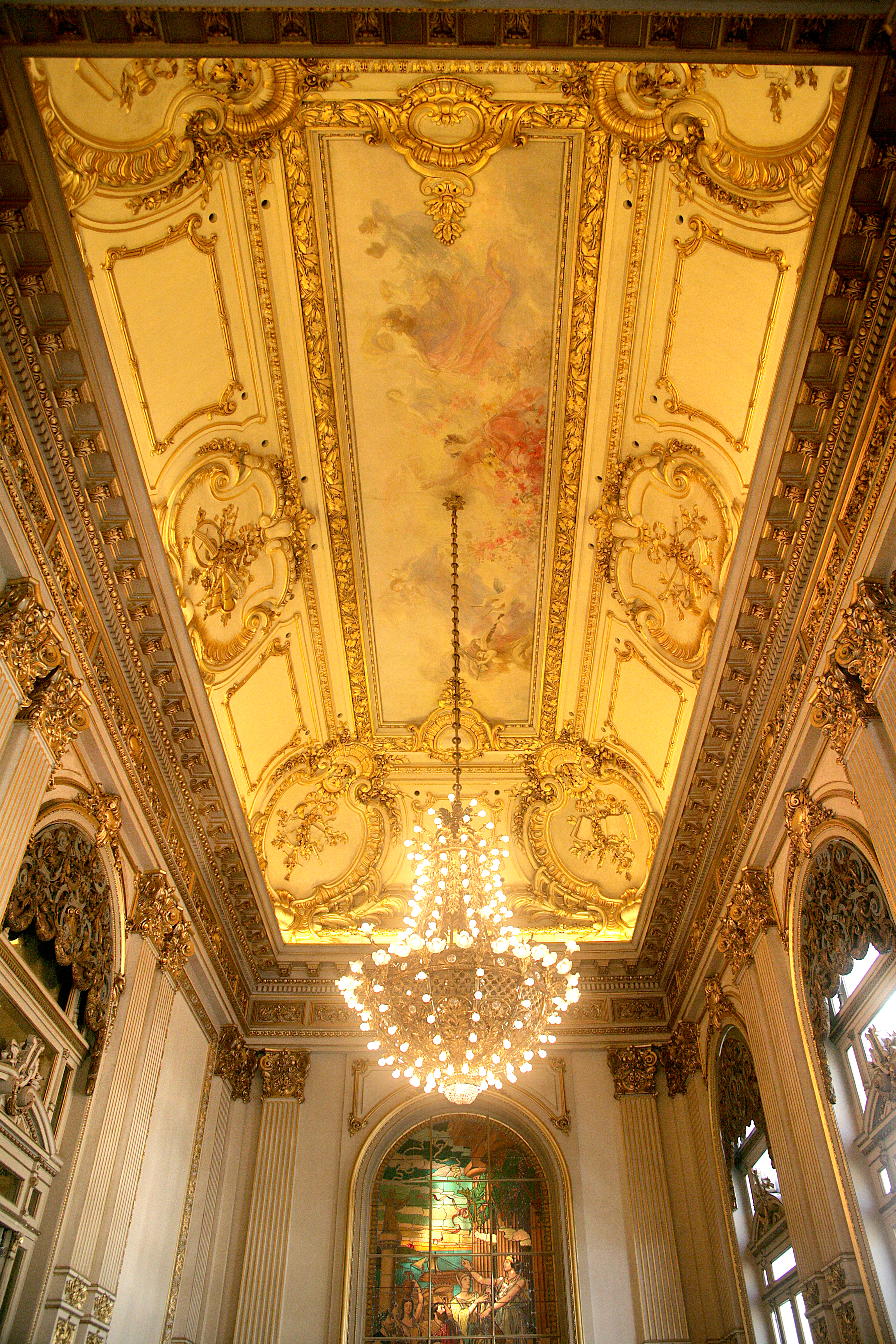 Teatro Colón. Salón Dorado.